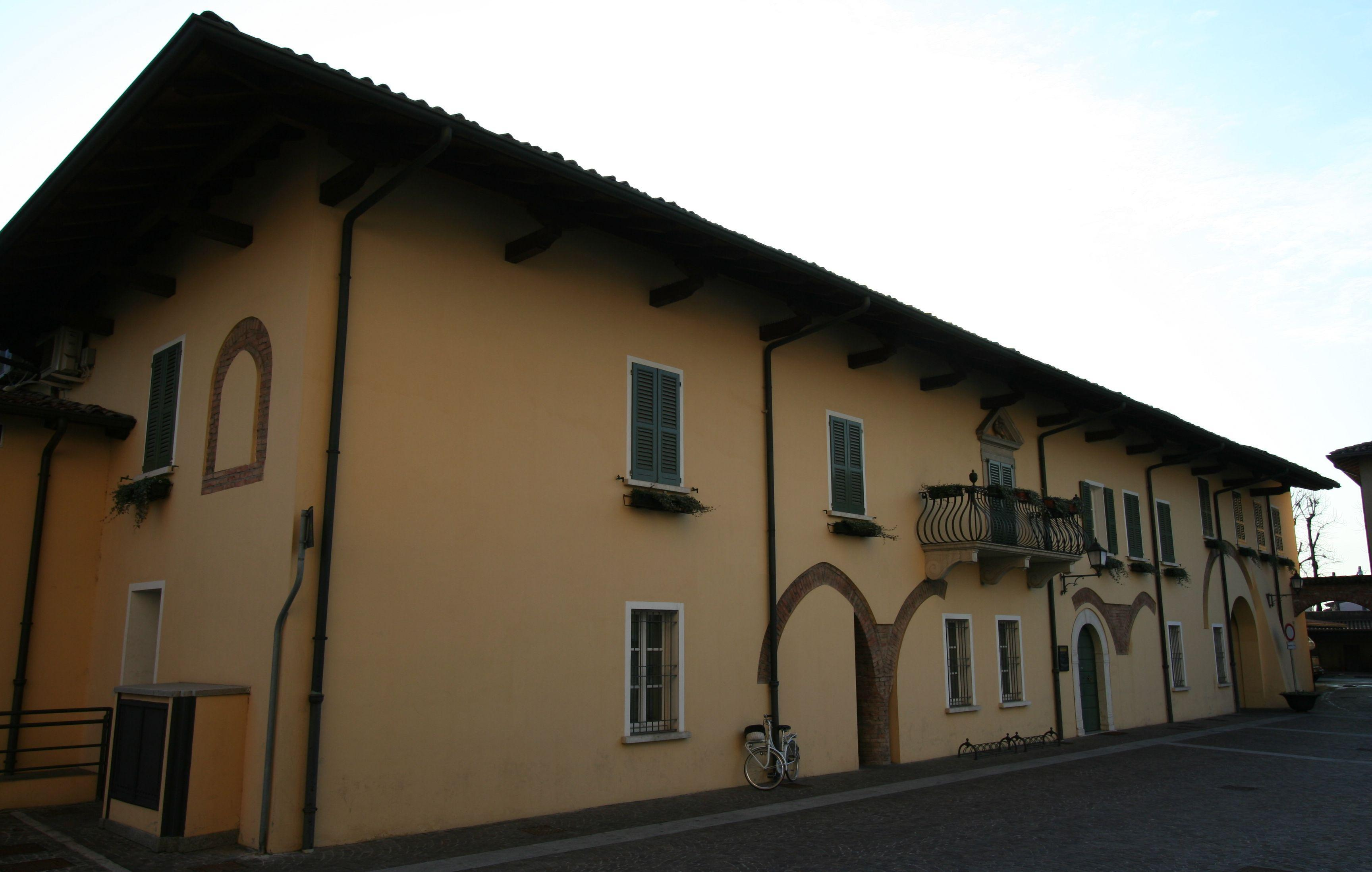 Palazzo Comunale Ghedi sec.XIV-XV